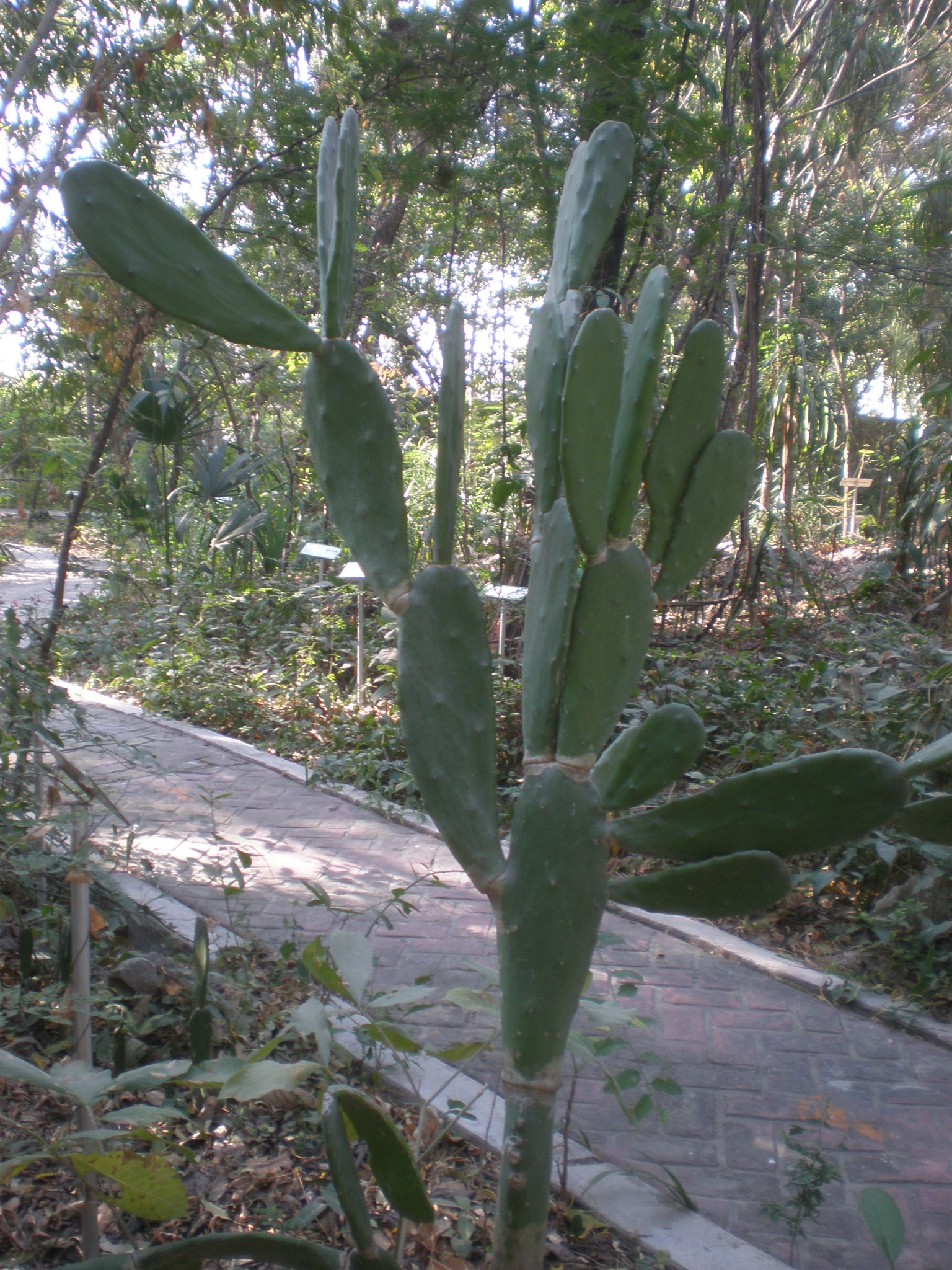 Jardín Botánico Faustino Miranda, Tuxtla Gutiérrez, Chiapas, México.